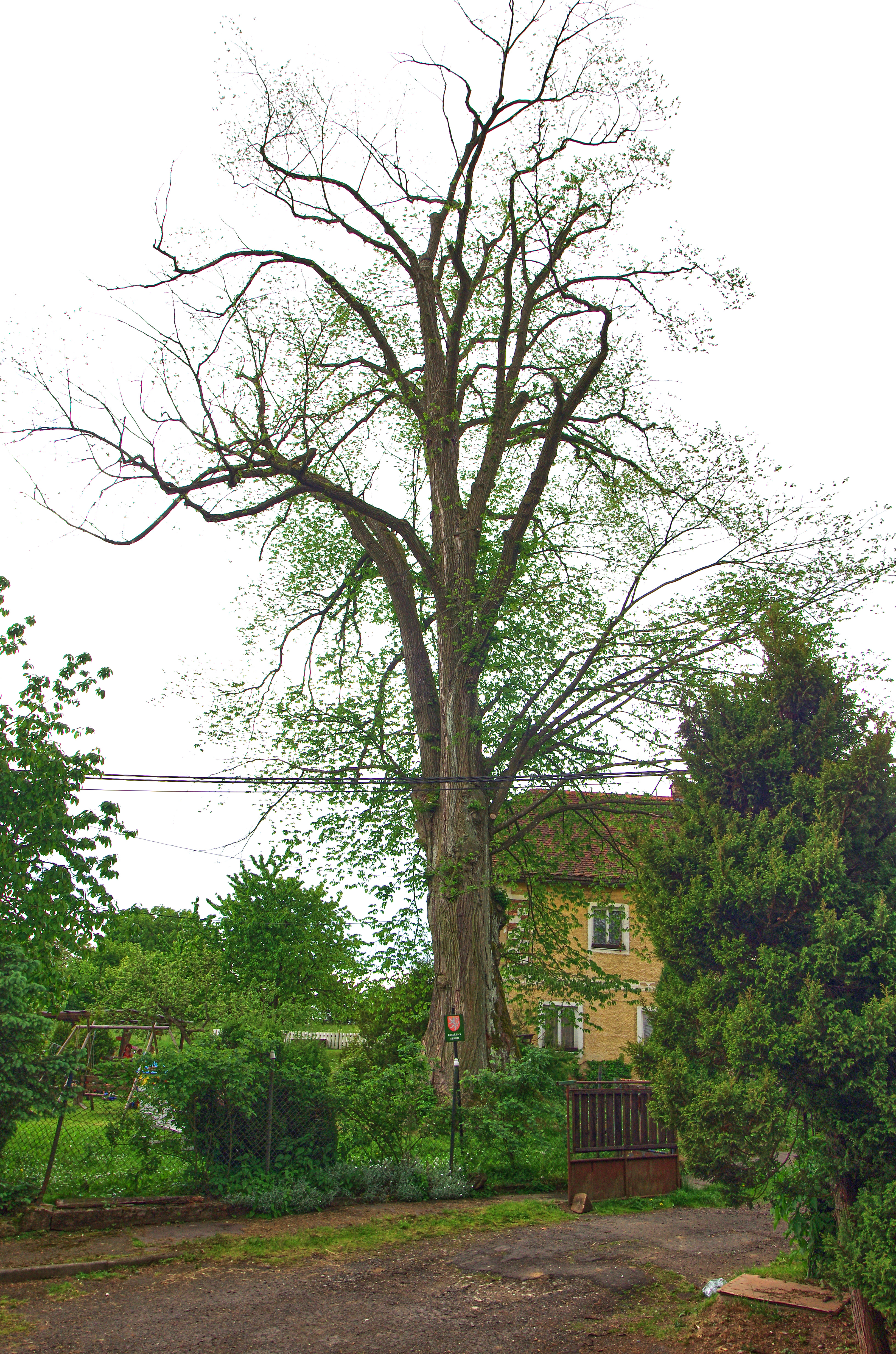 památný strom Jilm ve Vlkovicích, okres Cheb